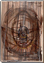 Ursprung des Lebens